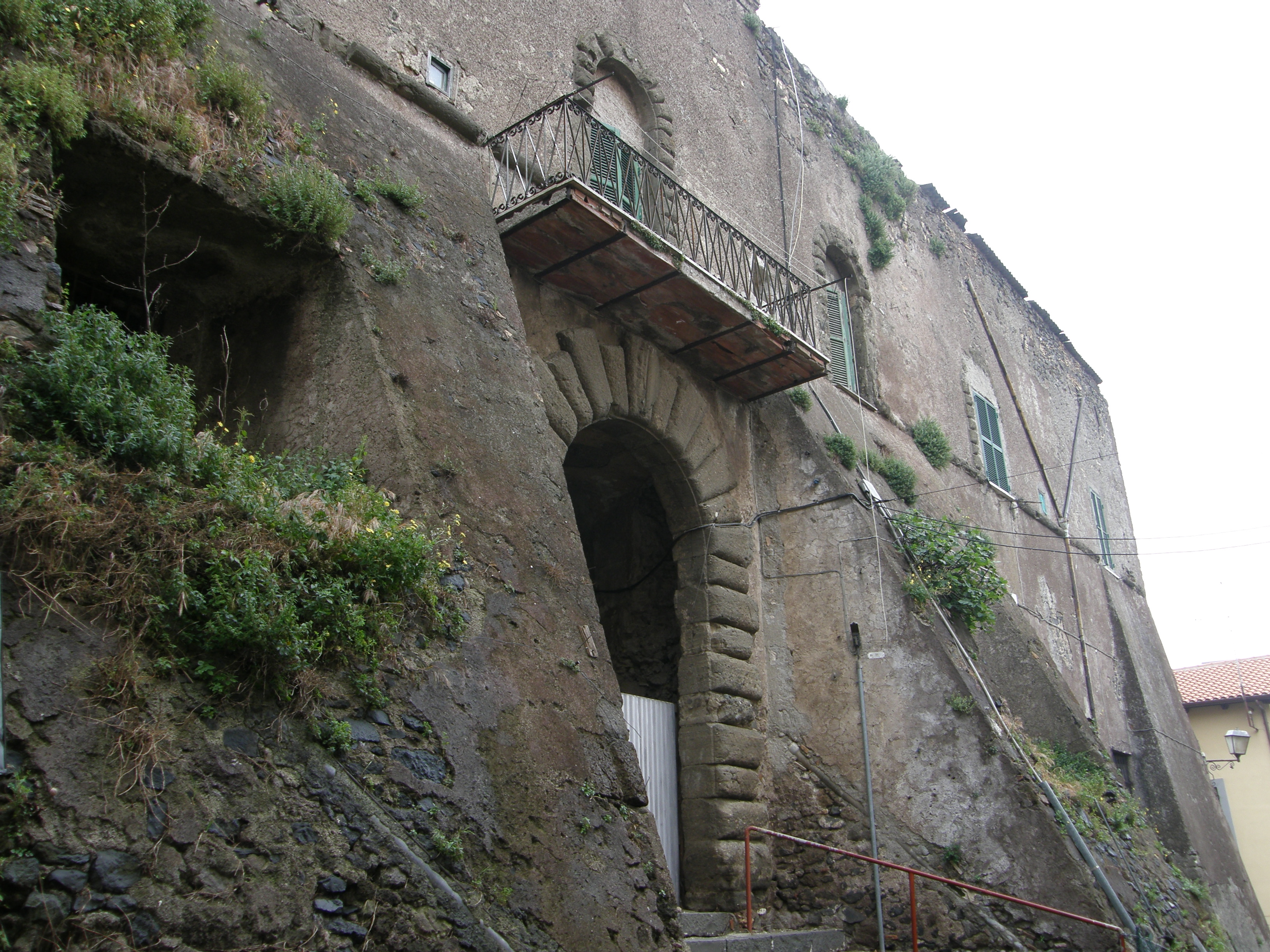 Palazzo Colonna (Palazzaccio)